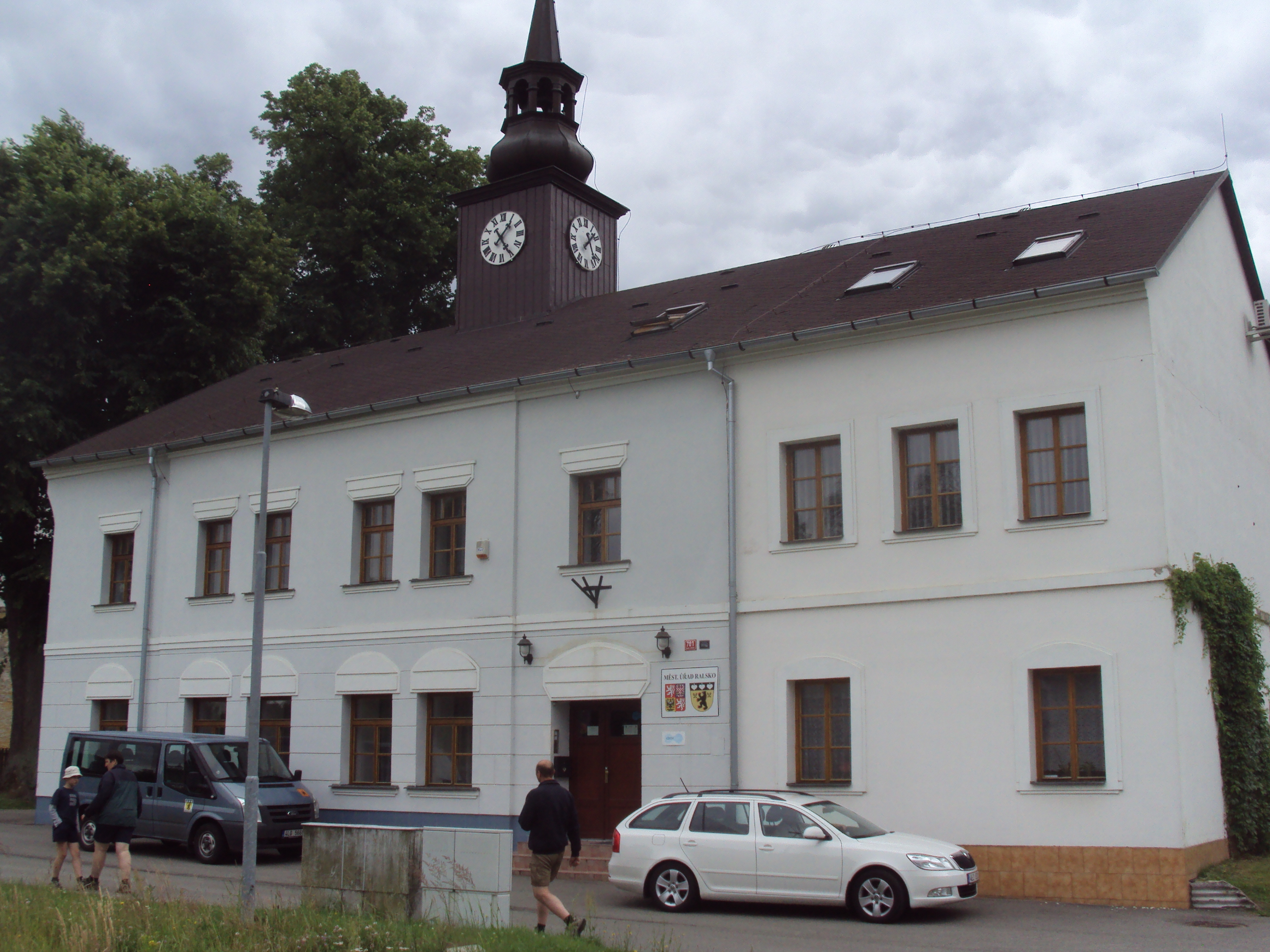 Městský úřad Ralsko je v Kuřívodech